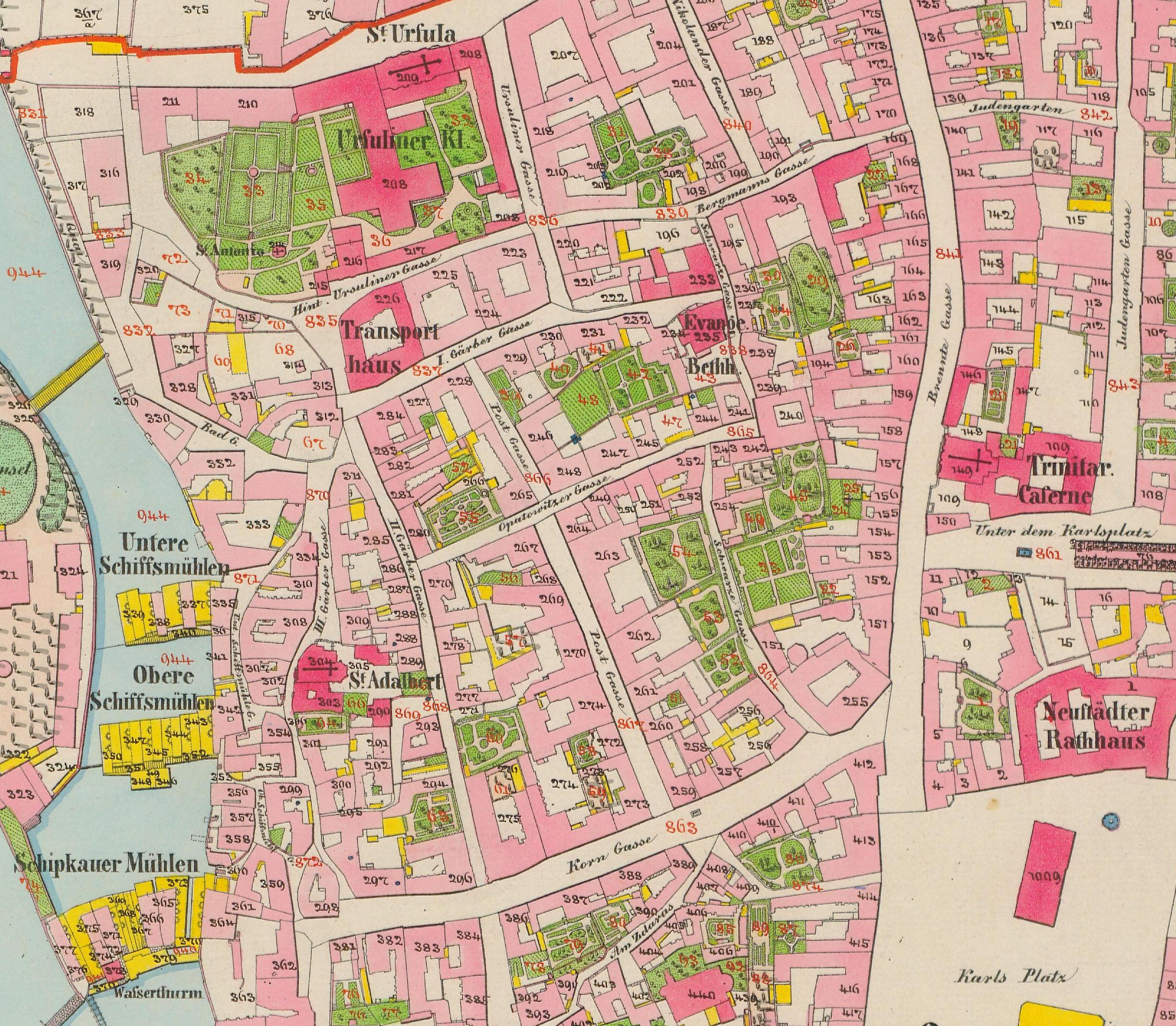 Území zaniklé obce Opatovice a jaho okolí na císařském otisku mapy Stabilního katastru. Katastrální území Nové Město (Neustadt), výřez z mapového listu XVI., stav k roku 1852.